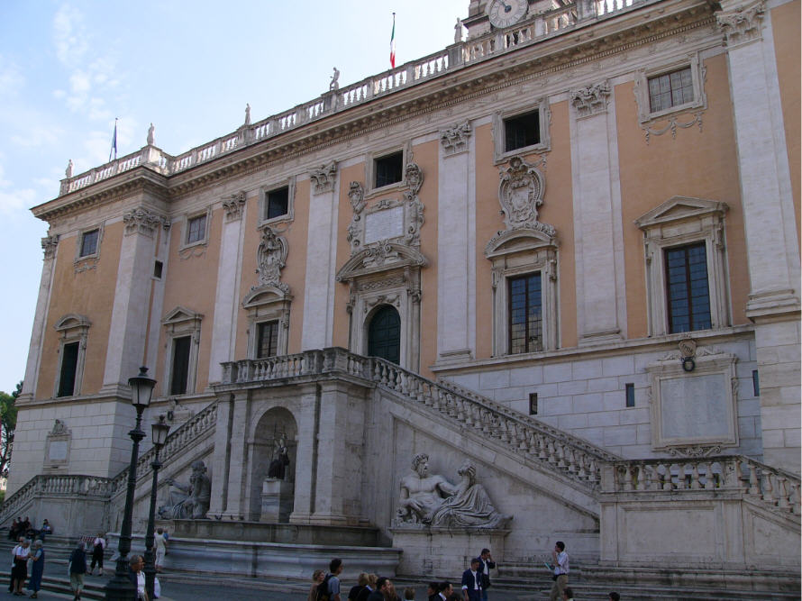 Das Foto zeigt den Senatorenpalast in Rom. Gemeinsam mit dem Konservatorenpalast und dem Palazzo Nuovo umrandet er den Kapitolsplatz. Seine Fundamente bilden das antike Tabularium, das Staatsarchiv des römischen Imperiums.